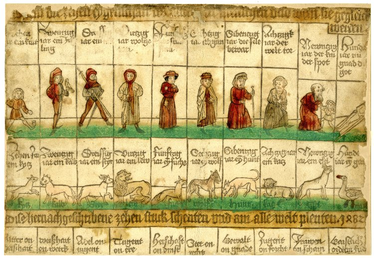 (D)is (s)ein die zehen eygenschaft des altters der menschen vnd wem sie gegleich(t) werden (enthält schon fast alle Elemente der späteren „Lebenstreppe“, die Altersstufen sind jedoch nicht als Treppen und damit als Aufstieg und Abstieg dargestellt)